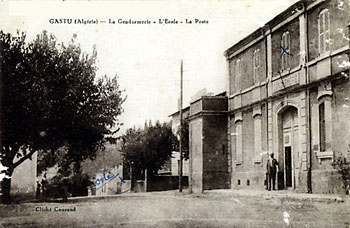 Photo de l'ancien village de Gastu, actuelle commune de Bekkouche Lakhdar (Skikda, Algérie).